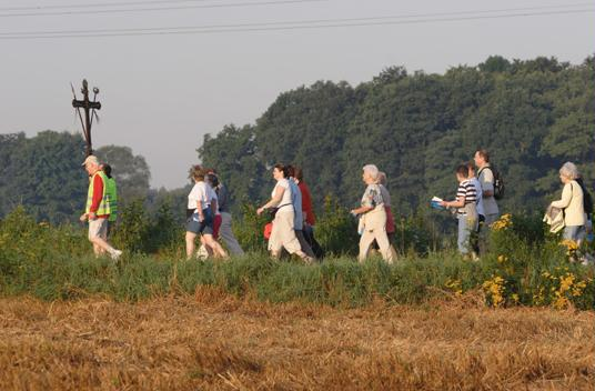 Gruppe bei der 331. Fußwallfahrt von Werne nach Werl 2007